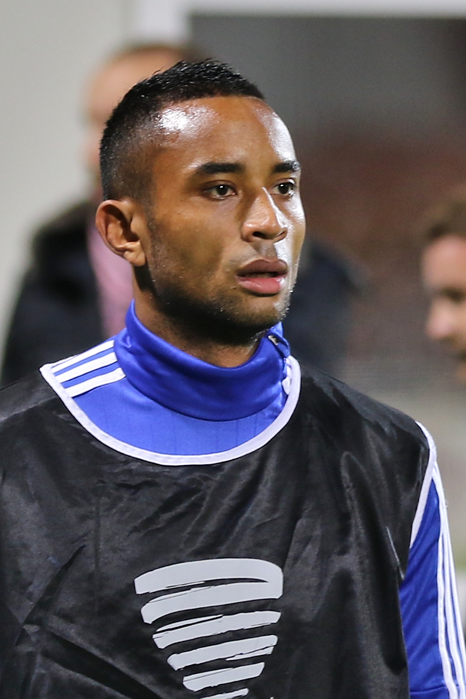 FBBP01 - FCN - 20151028 - Coupe de la Ligue - Loïc Damour